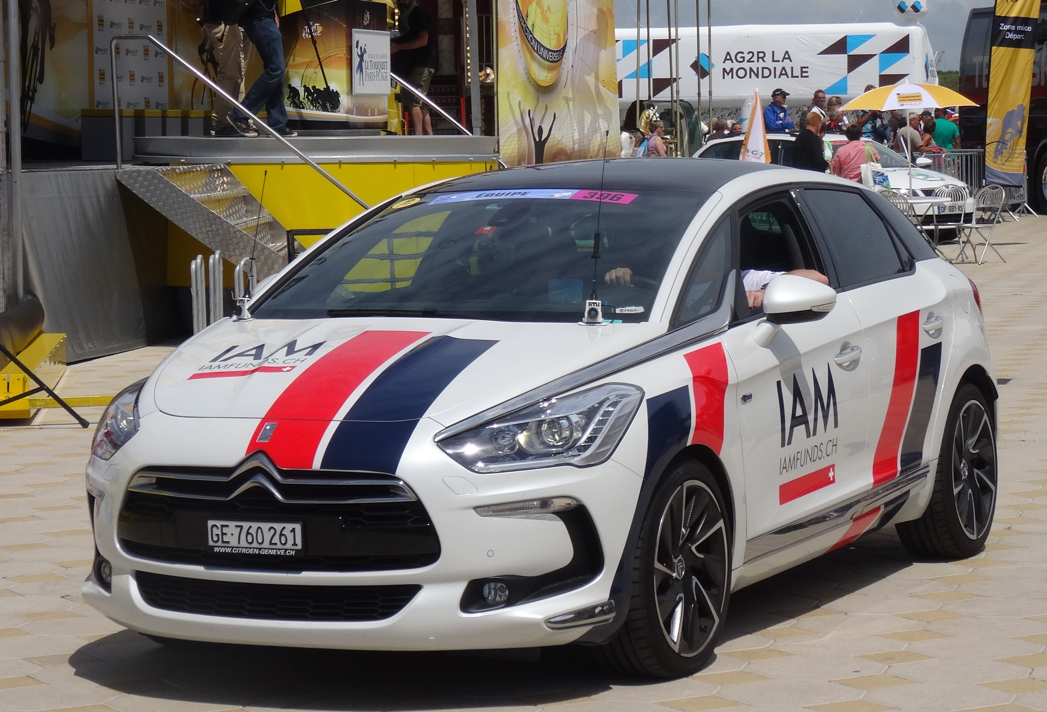 Reportage photographique réalisé le mardi 8 juillet à l'occasion du départ de la quatrième étape du Tour de France 2014 au Touquet-Paris-Plage, Nord-Pas-de-Calais, France.